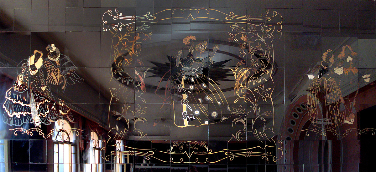 Painel de cristal negro com gravações em ouro no Salão dos Cristais do Clube do Comércio de Porto Alegre, Brasil. Inaugurado em 1939-40.